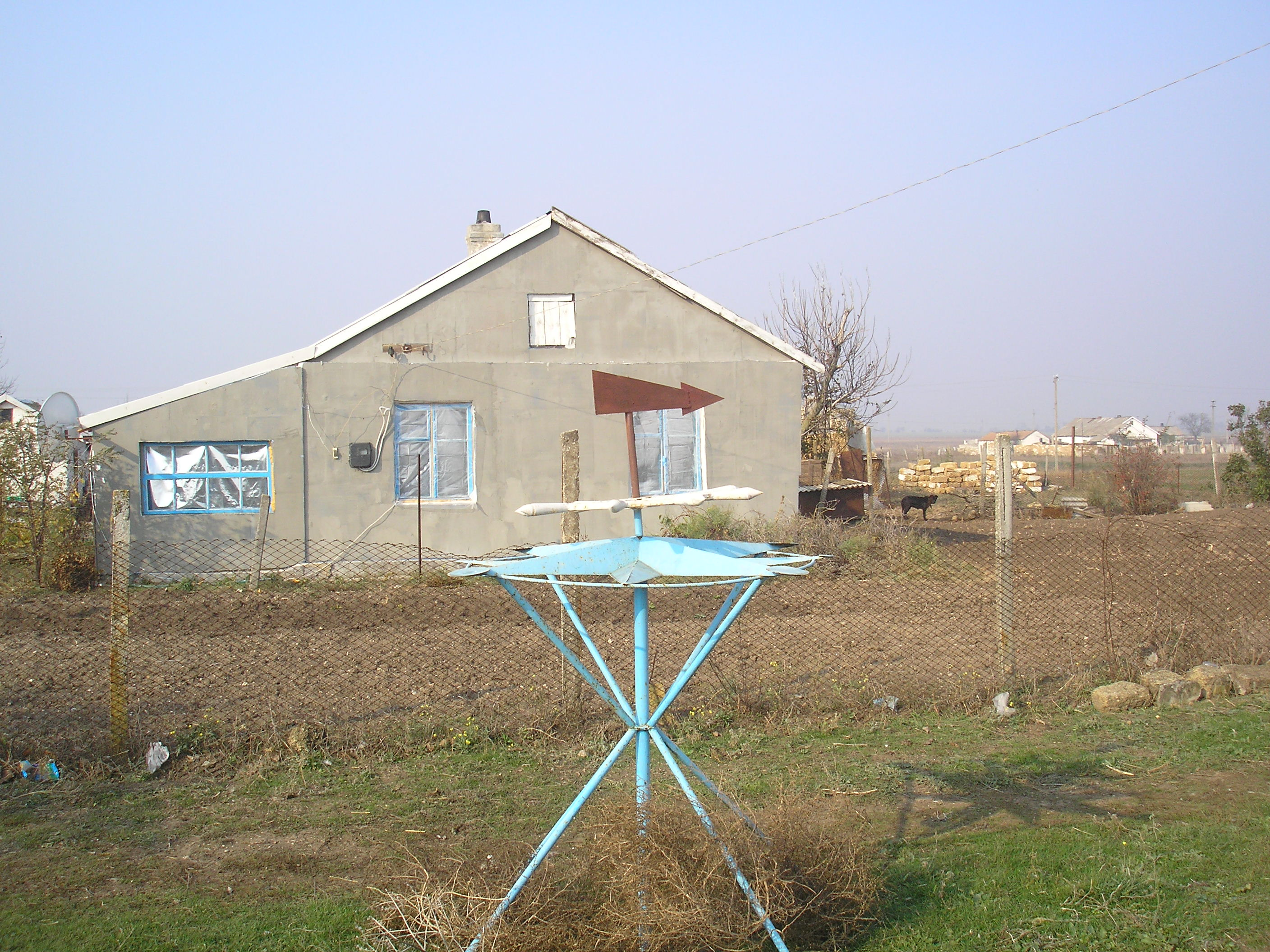 Село Азов, Красногвардейский район, Крым. Географический центр Крыма